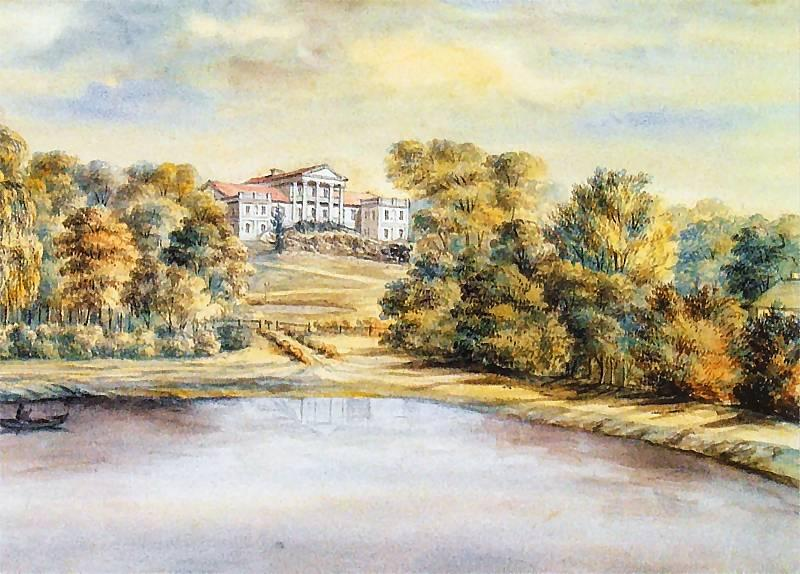 Onuškio dvaras